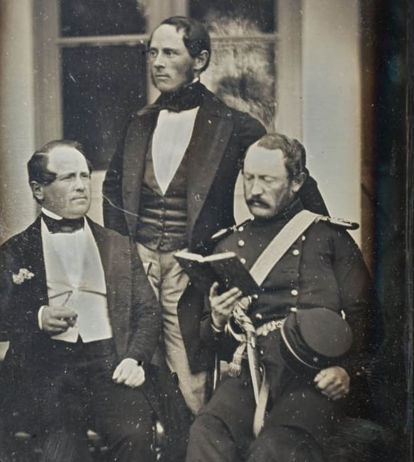 Gruppbild av tre män